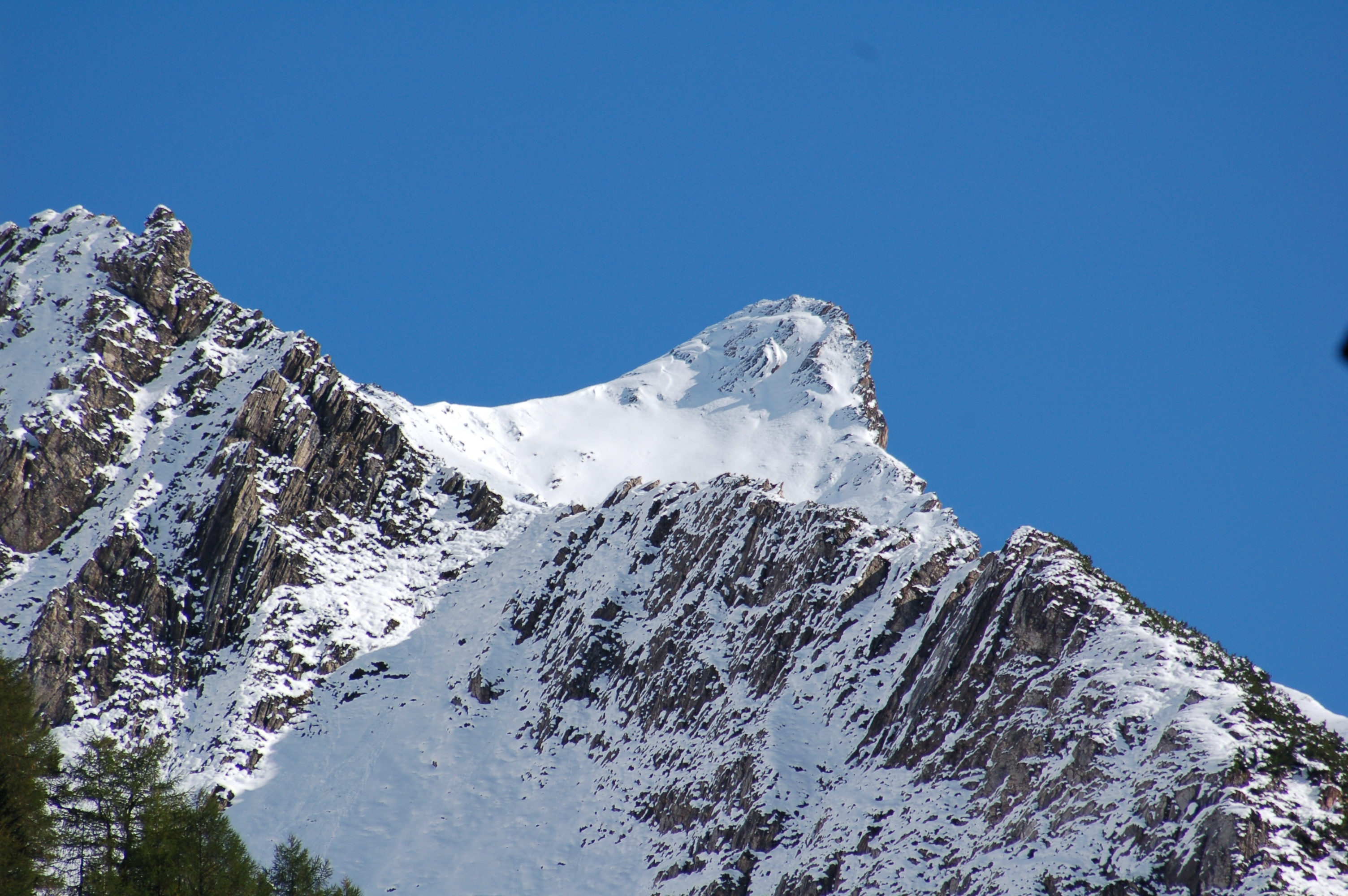 Frauenwand von Kasern (Schmirn) aus betrachtet